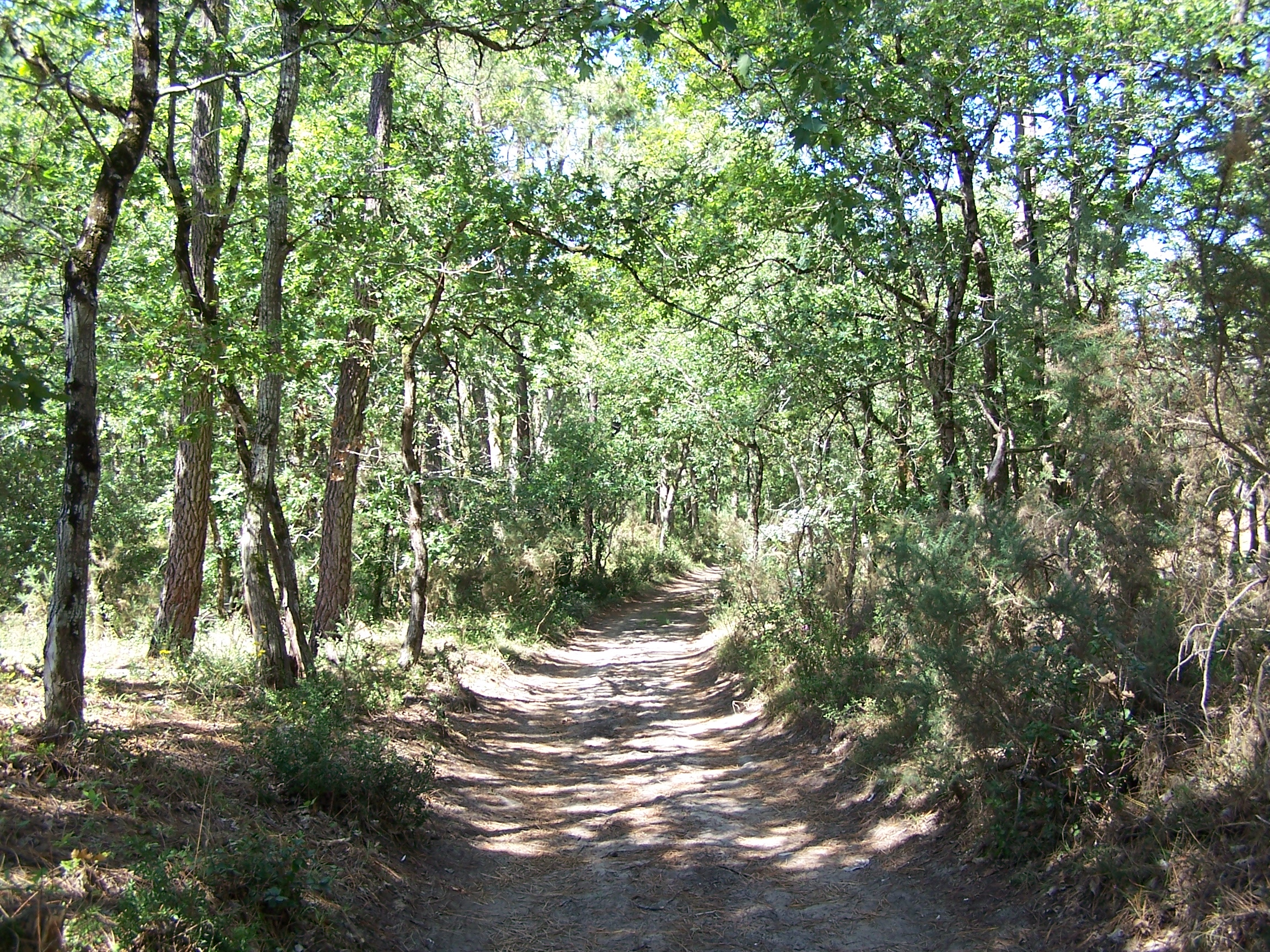 Photographie prise dans la forêt de la Coubre, une forêt domaniale couvrant plus de 4 277 hectares en bordure du littoral de la presqu'île d'Arvert, en Charente-Maritime, sur les communes des Mathes et de La Tremblade. C'est une forêt de pins maritimes, de chênes verts, de chênes pédonculé et d'arbousiers qui a été plantée au début du XIXe siècle pour contenir l'avancée des sables et protéger le site des érosions éolienne et marine très actives. Classée forêt littorale de protection, elle abrite une faune variée comportant notamment des cerfs élaphes, des chevreuils et des sangliers.